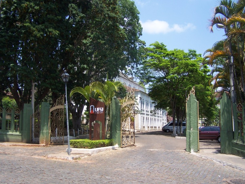 Universidade Federal de São João del-Rei, Rua D. Pedro II de Sabará - Minas Gerais, Brasil.